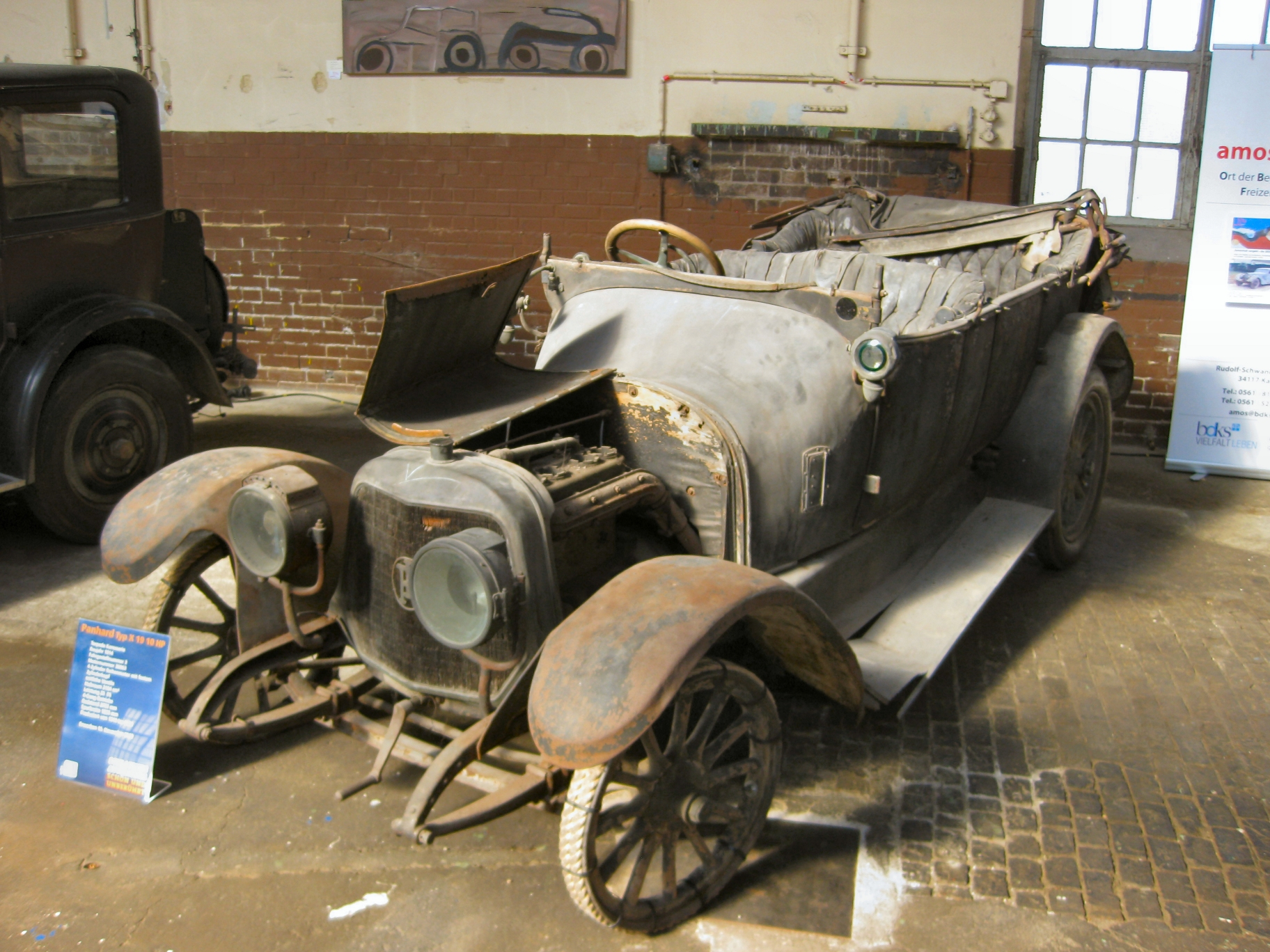 Panhard X 19 aus Schlumpf-Sammlung